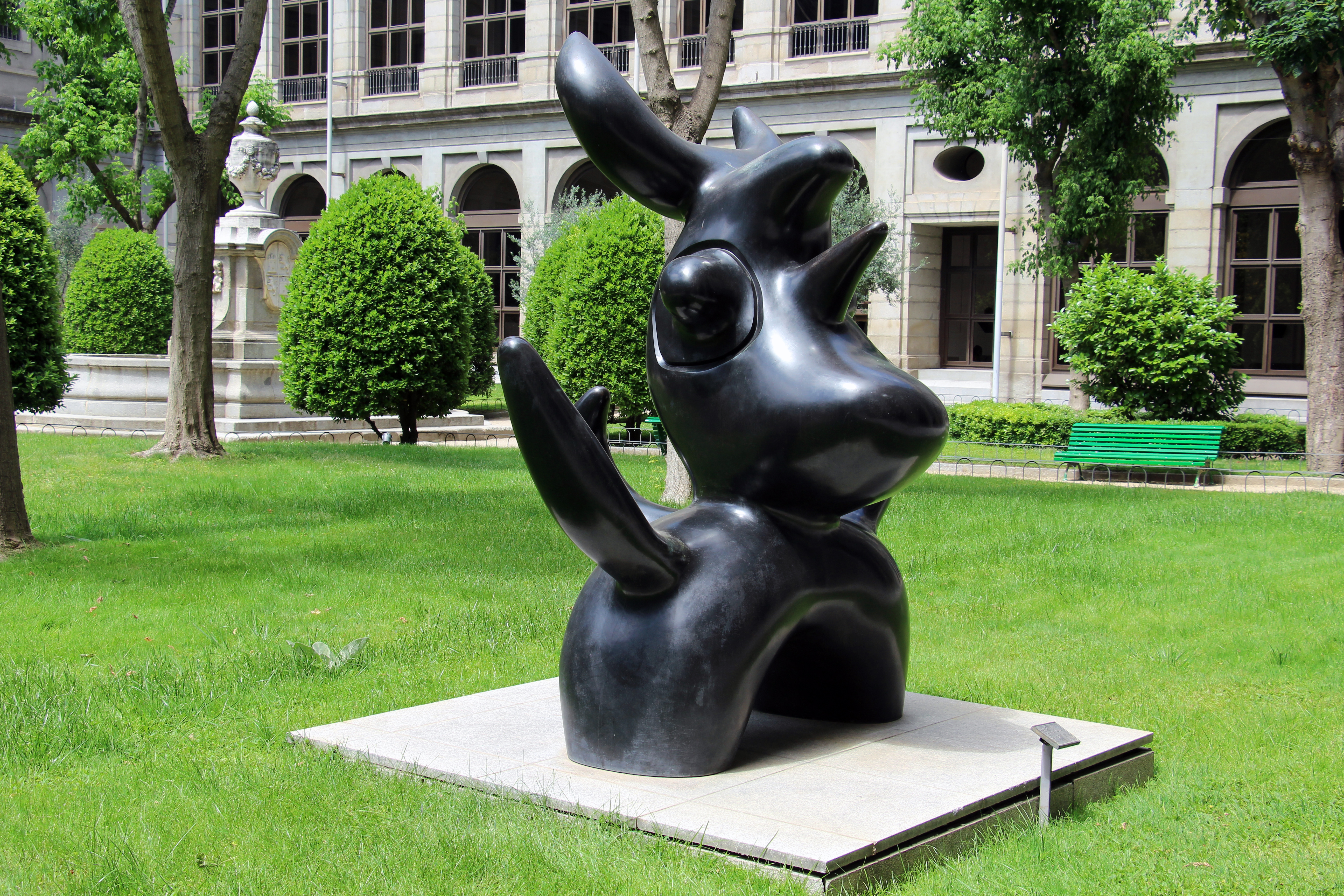 Lavapiés | Calle de Santa Isabel "Oiseau lunaire (Pájaro lunar)", Joan Miró, 1966